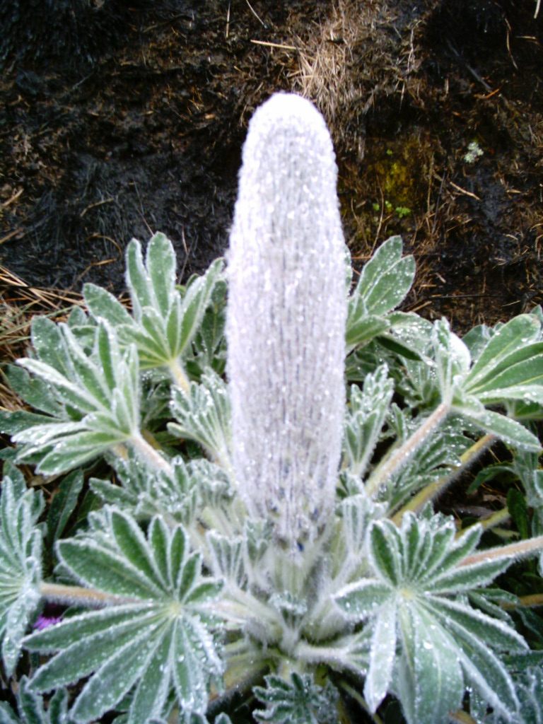 Se llama Lupinus alopecuroides de la familia Fabaceae; no Frailejon o Espelettia de la familia Asteraceae.